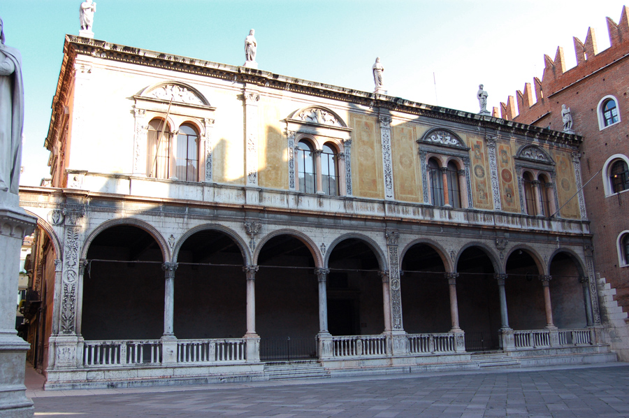 Fotografia della Loggia del Consiglio a Verona